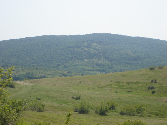 Склонът на Свети Илийските възвишения, северно от село Сокол, Сливенска област, България